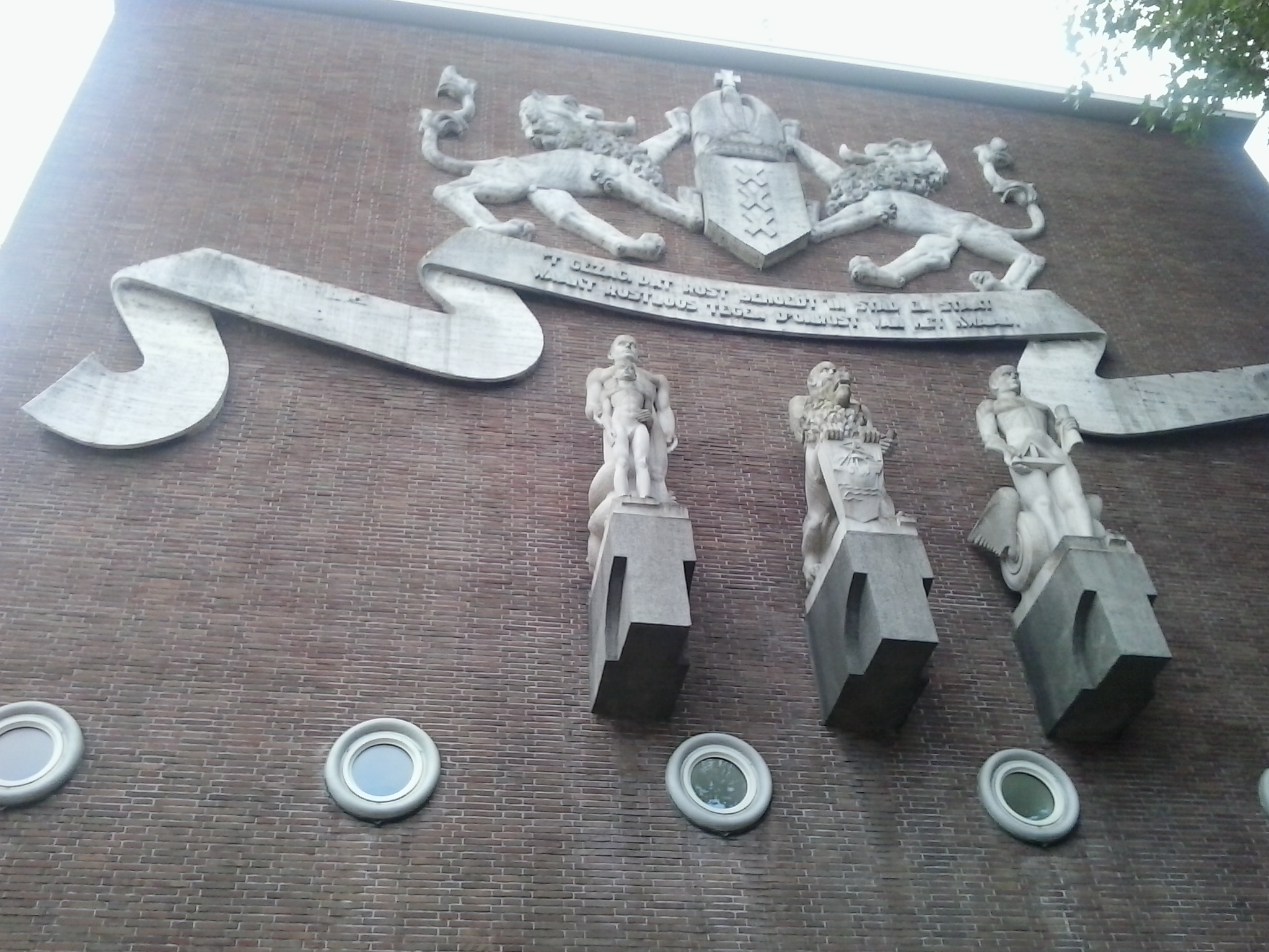 De gevel van het "Hoofdbureau van Politie" aan Elandsgracht 117 in Amsterdam, gezien van beneden voor de ingang aan de Elandsgracht.